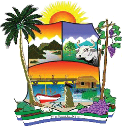 Escudo del municipio Mara, estado Zulia, Venezuela